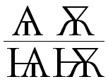 Jusy.